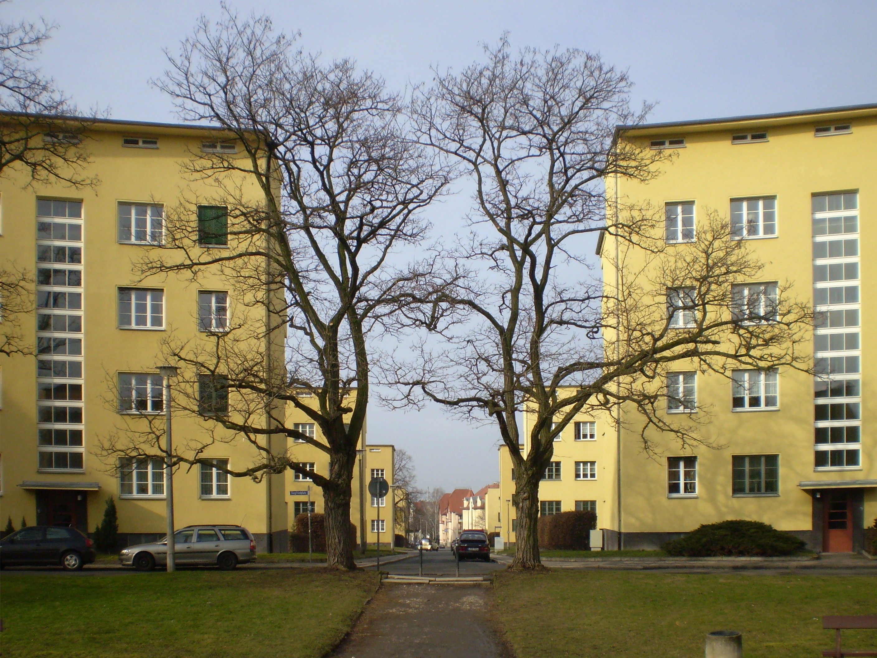 Blick vom Siegfriedplatz in Richtung Siegfriedstraße (Westteil), Rundling Leipzig-Lößnig